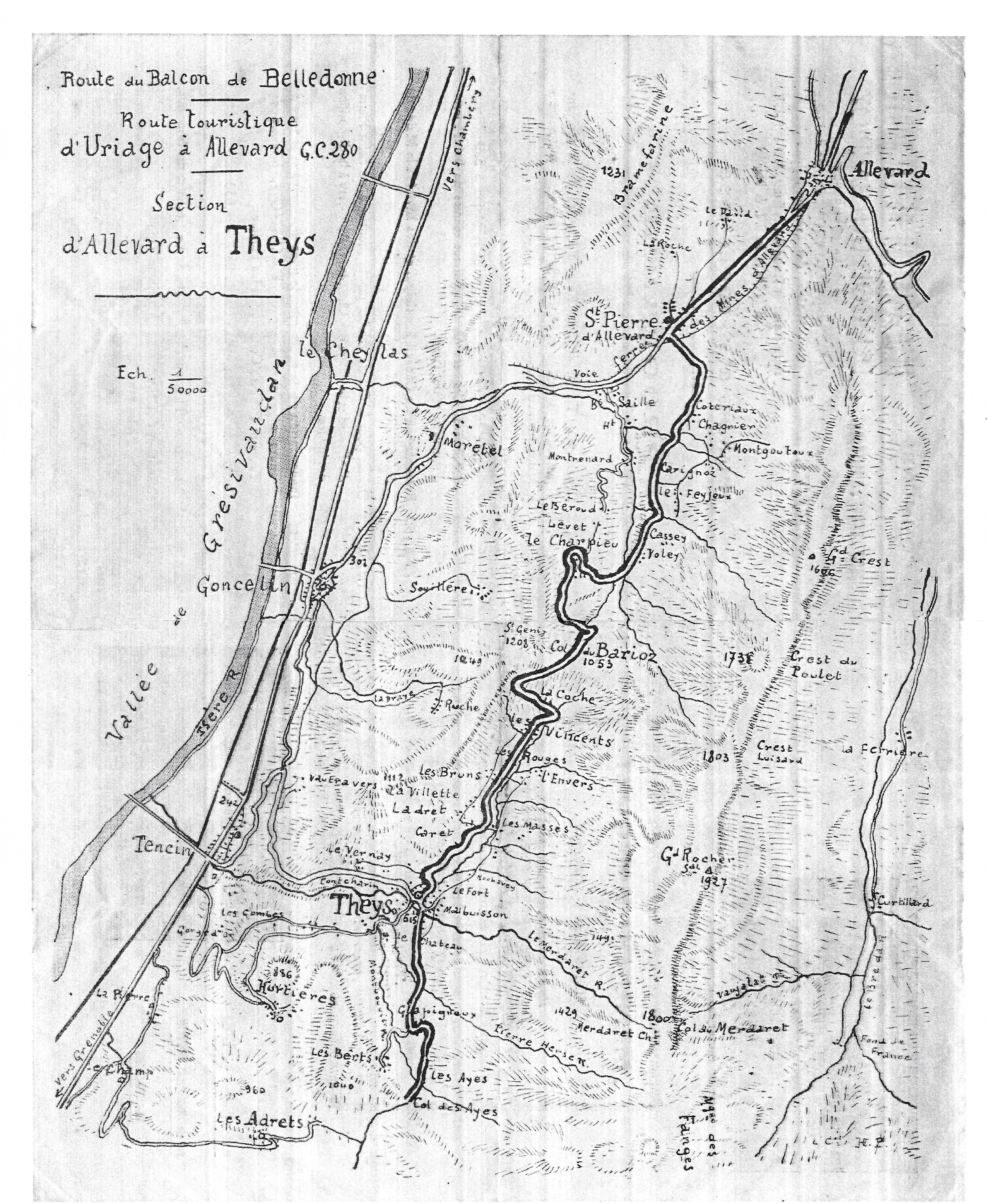 Document papier présentant le projet du premier tronçon, entre Allevard et Theys, de la nouvelle route touristique devant relier Allevard à Uriage, inauguré en 1933.